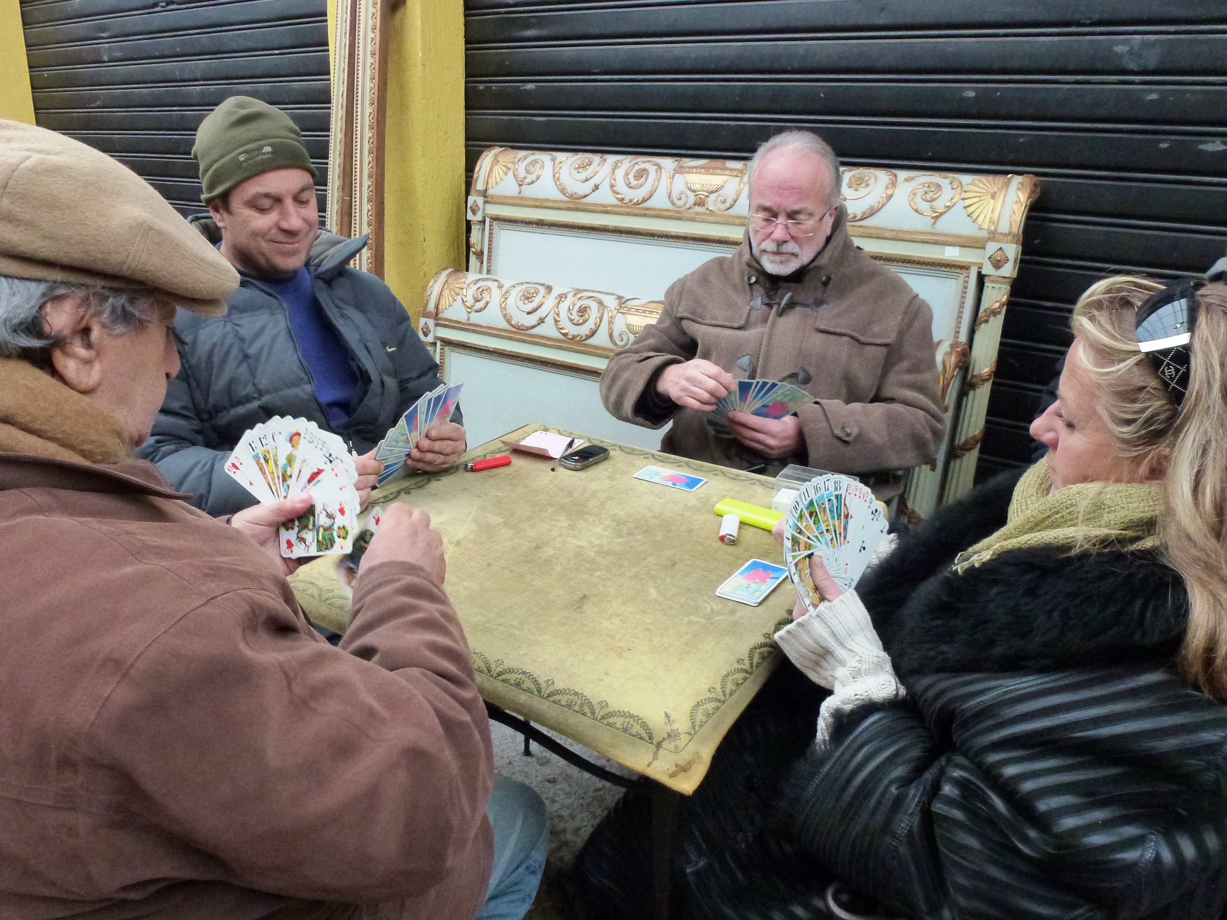 Joueurs de tarot au marché aux puces de Saint-Ouen